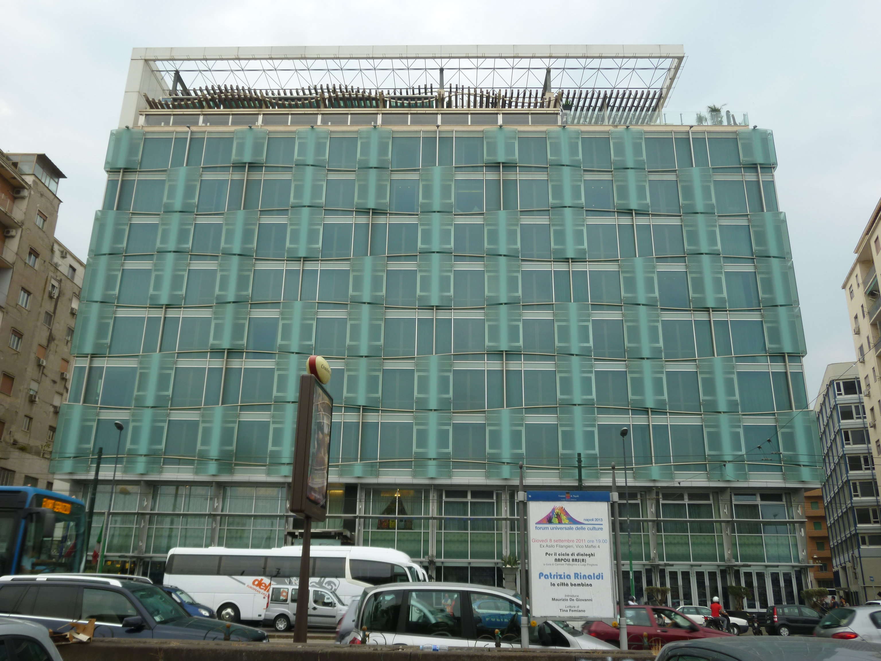 Napoli